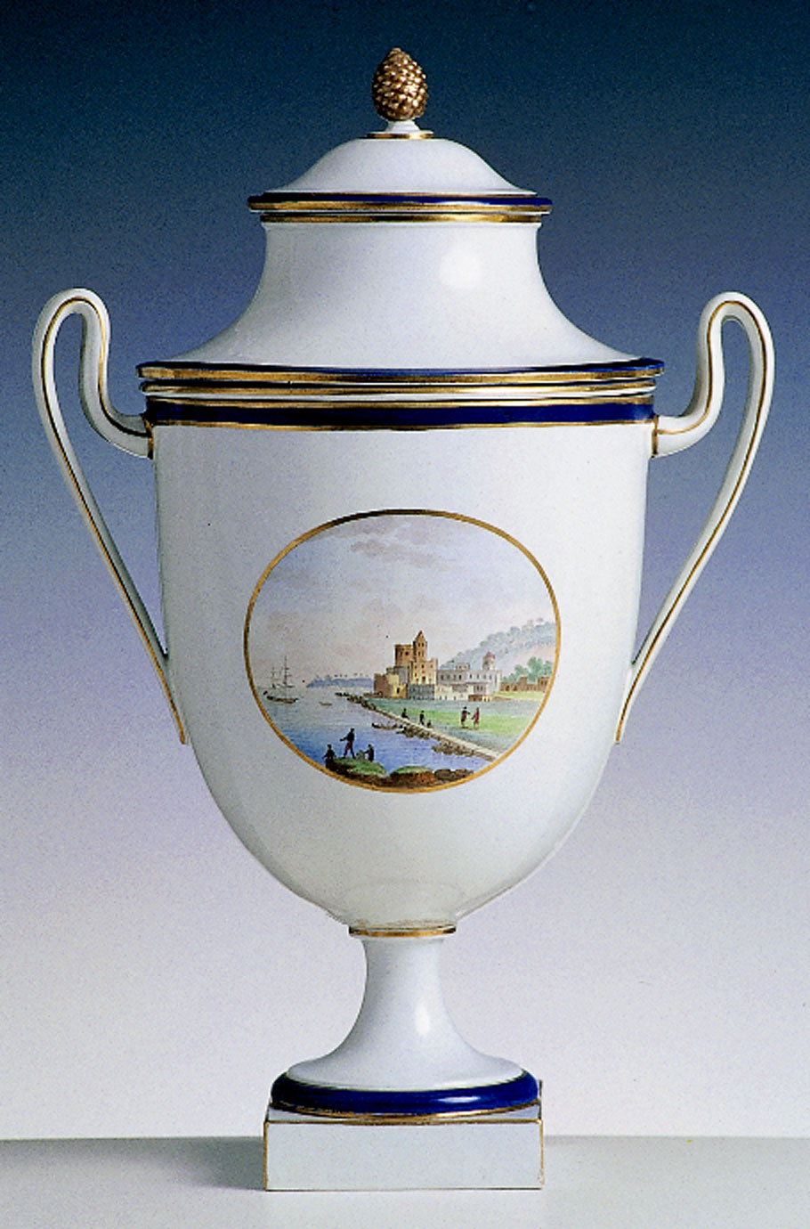 Geliera in porcellana dipinta con una scena a veduta. Ginori a Doccia, primo quarto del XIX secolo.